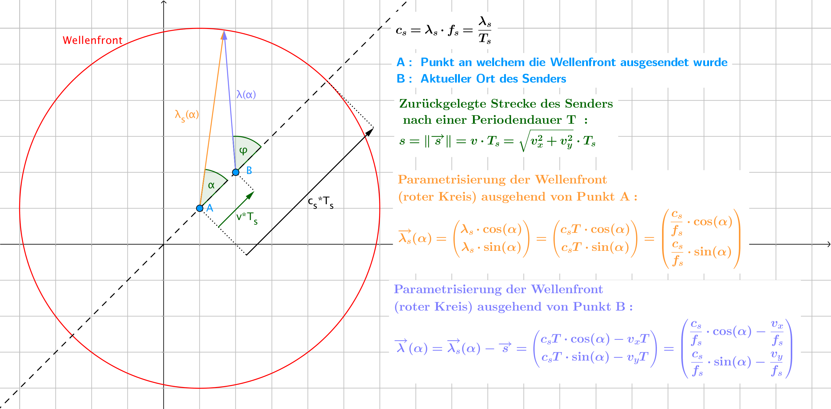 MachscherKegelDynWBHerleitung